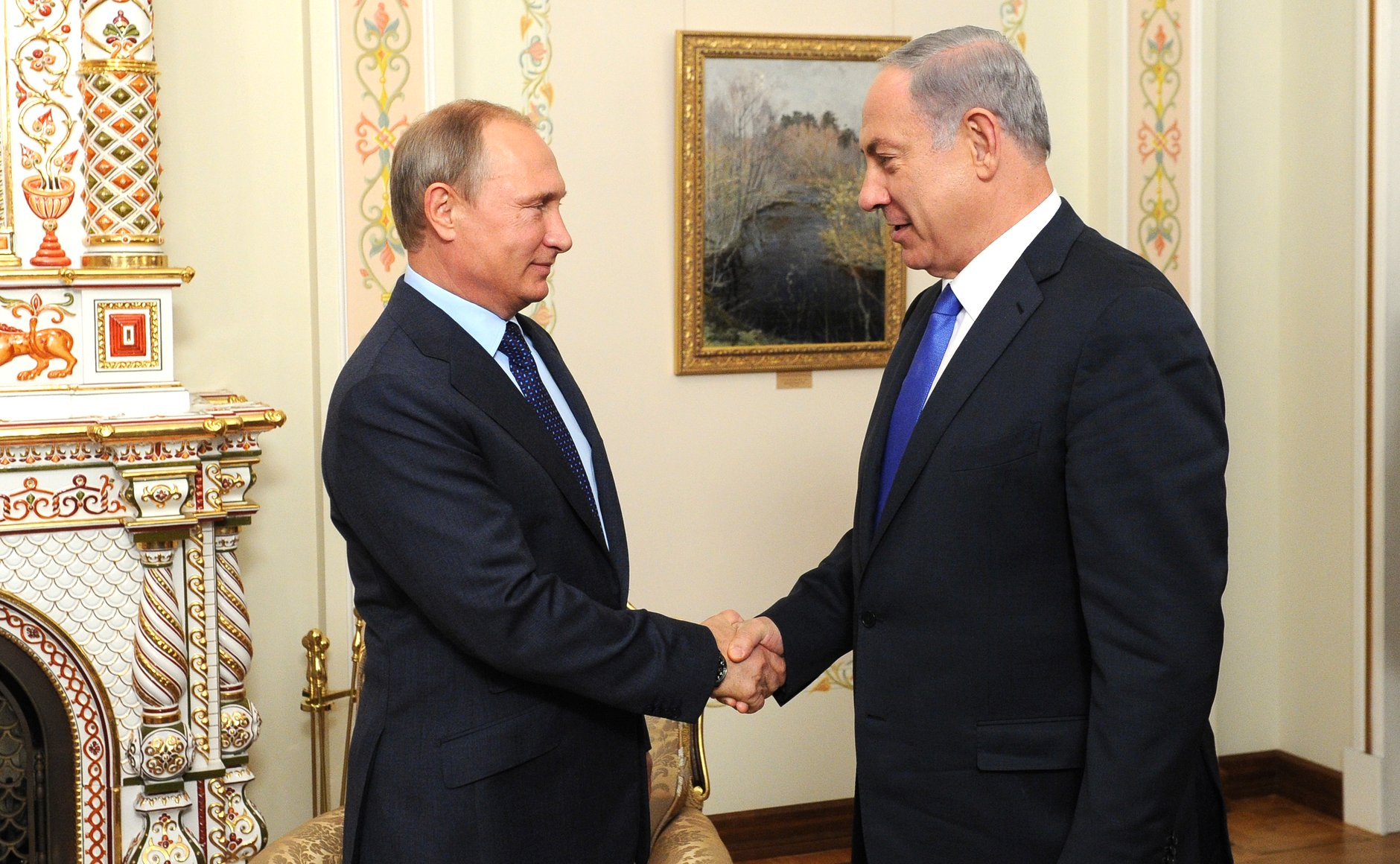 Встреча Президента России Владимира Путина с Премьер-министром Израиля Биньямином Нетаньяху